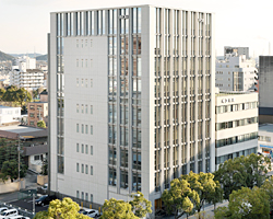 WDBホールディングス本社ビル